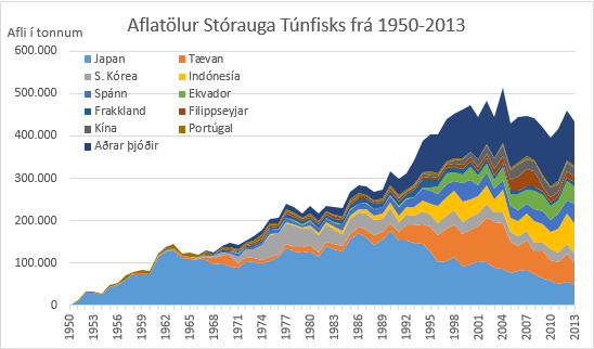 Veiddur afli af Stórauga Túnfisk